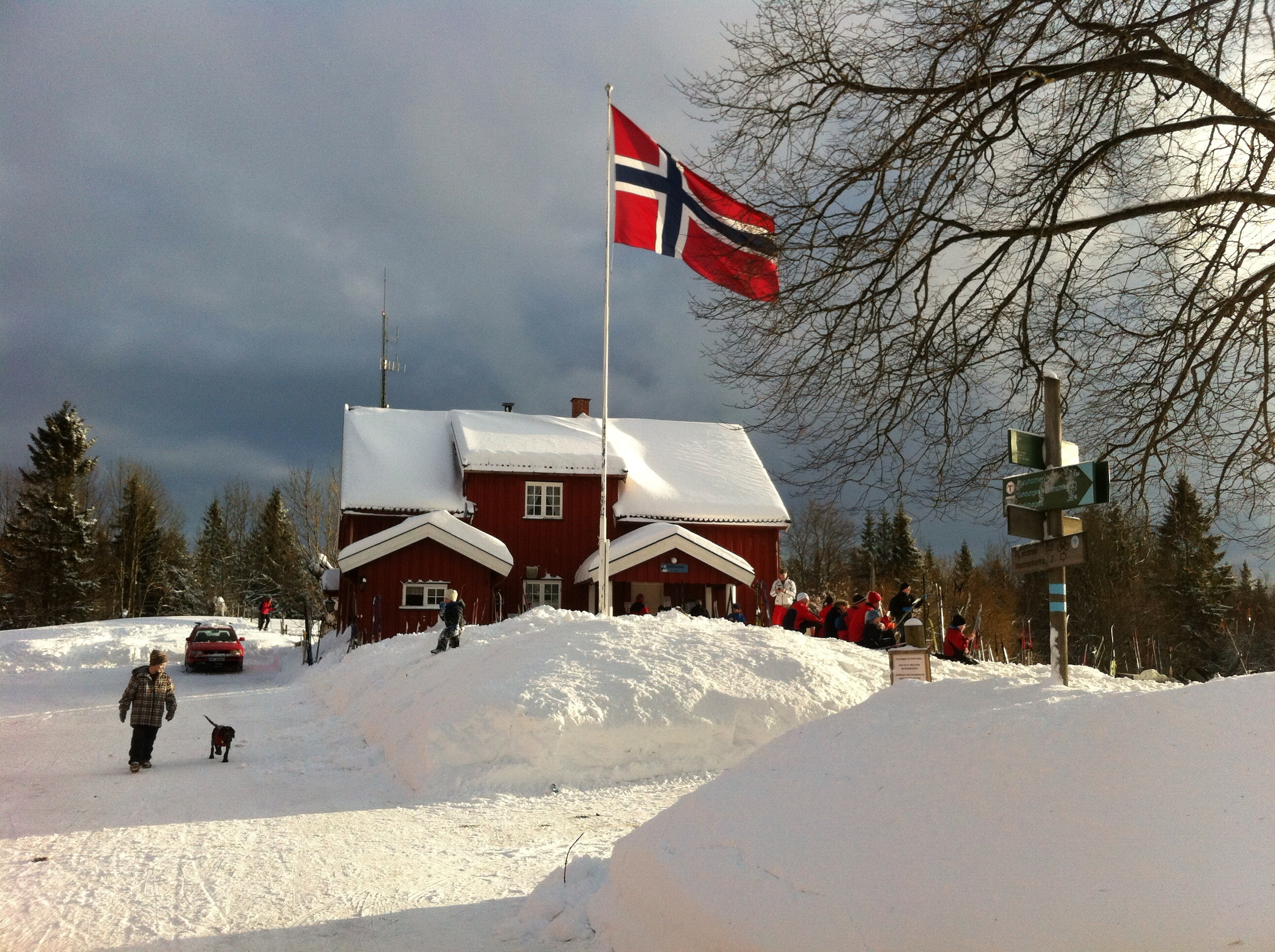 Serveringssted, Markastue i Bærum